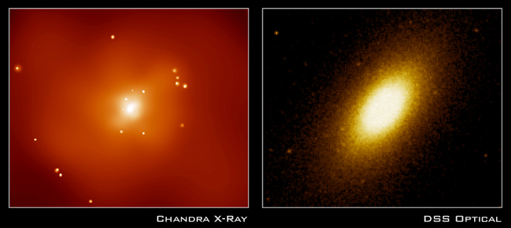 NGC 720 (SDSS e Chandra)